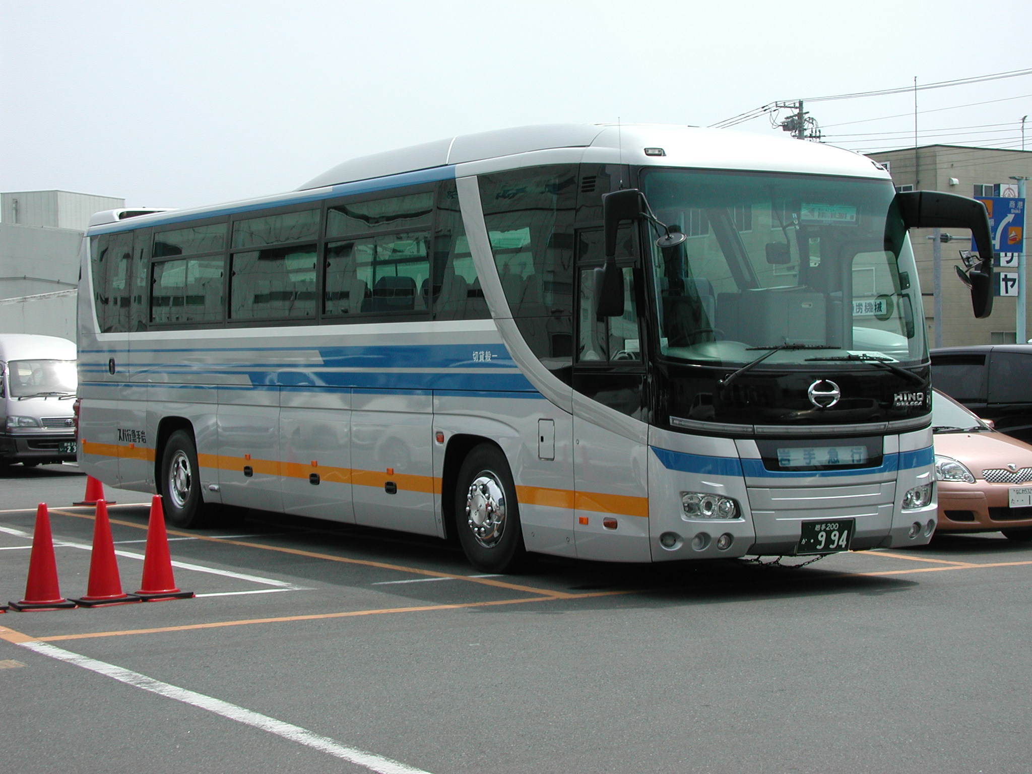 岩手急行バス：観光貸切塗装 - 日野・セレガハイデッカー（ADG-RU1ESAA） 宮城県気仙沼市：海鮮市場 海の市にて